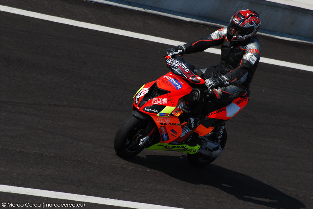 Prove libere della prova bresciana del Trofeo Malossi 2008 disputate sabato 19 luglio sul curcuito di Franciacorta